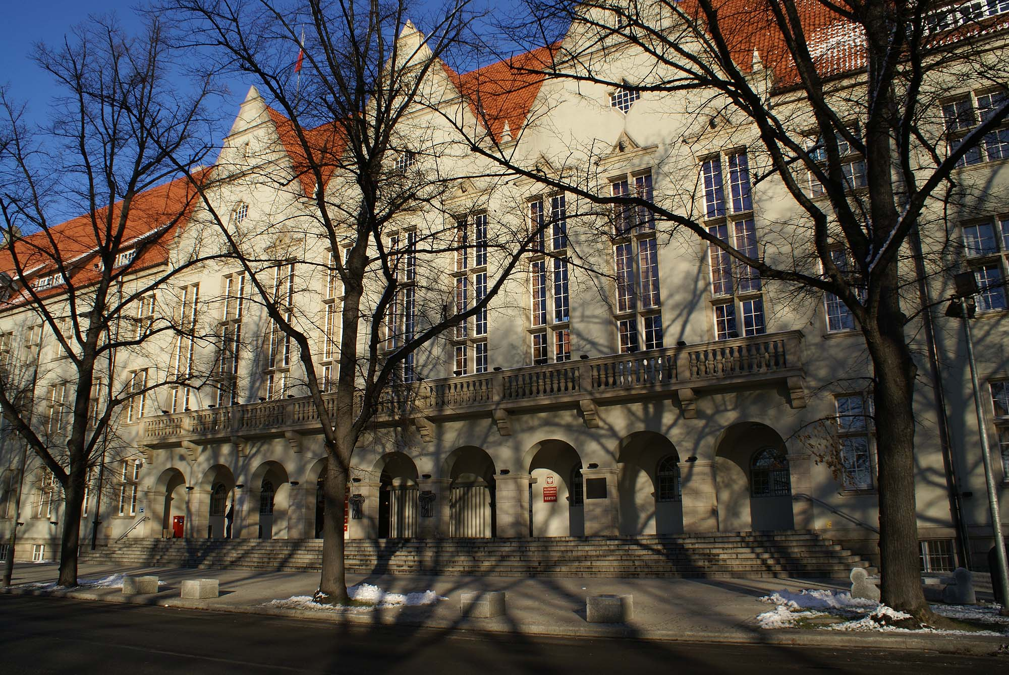 Wrocław, zespół Politechniki Wrocławskiej, 1905-1911, 1935